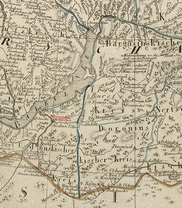 Итацинский острог на германской карте 1792 года